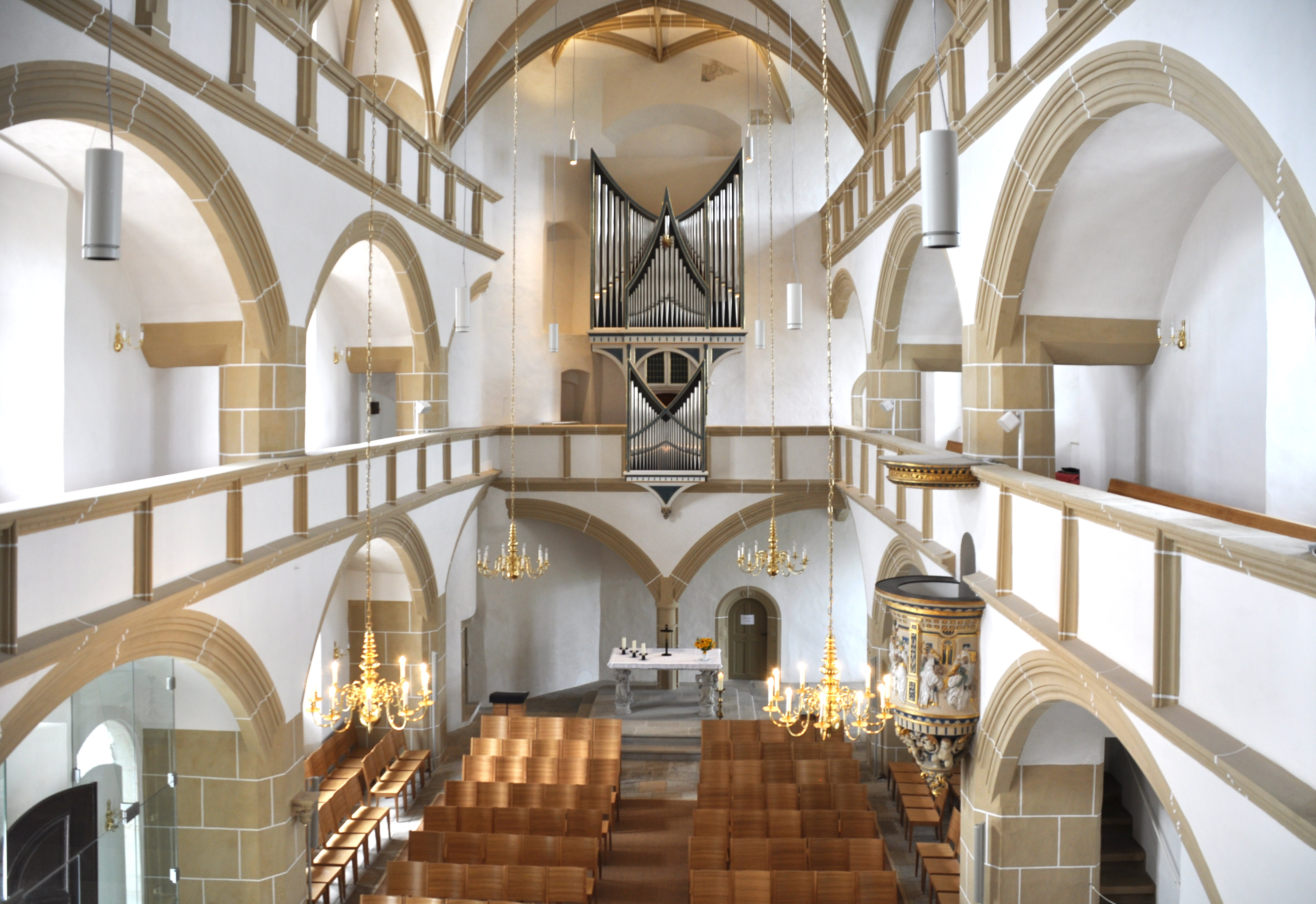 Torgau, Schloss Hartenfels, Schlosskirche, Innenansicht